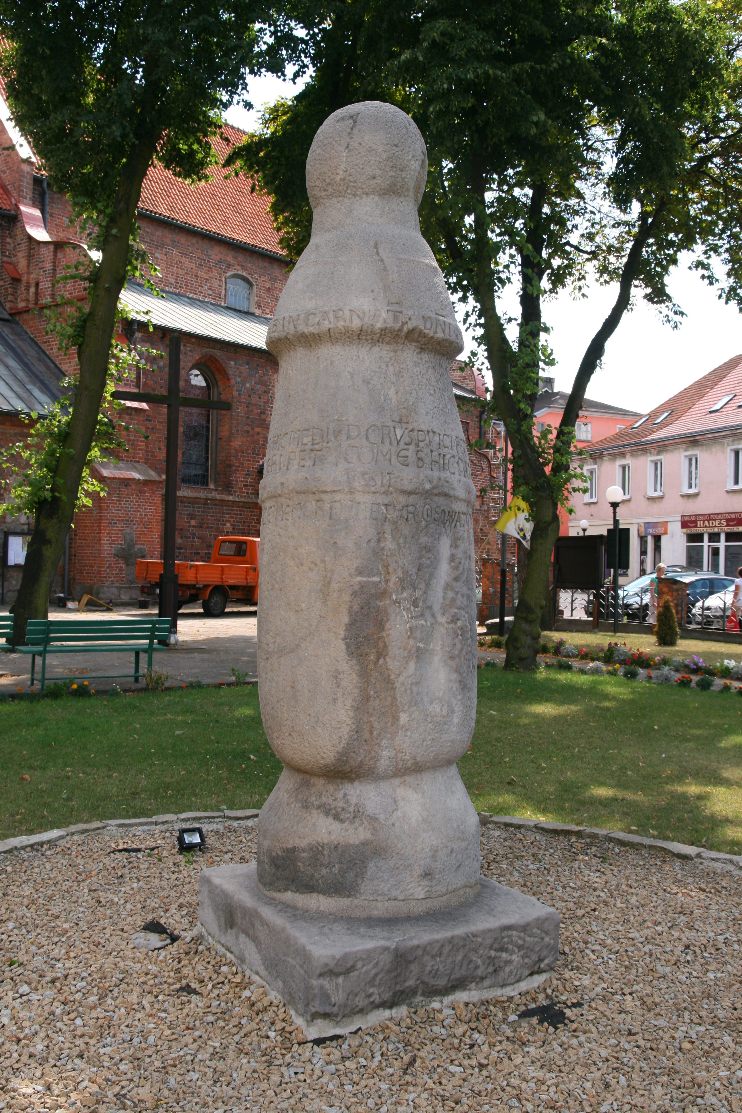 Słup milowy w Koninie - najstarszy znak drogowy w Polsce.